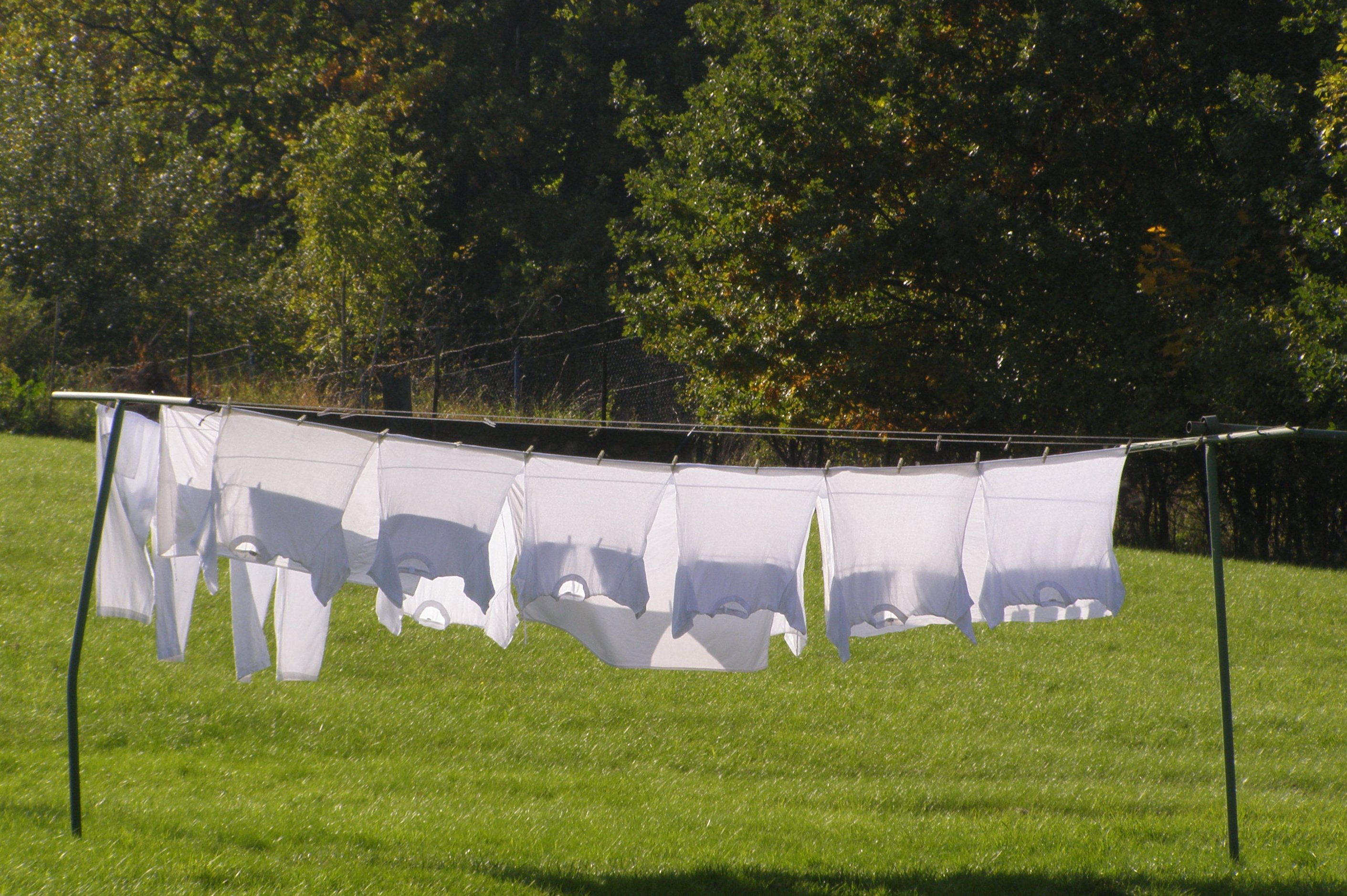 Frýdlant, lokalita Hág, ulice Jizerská, pověšené vyprané prádlo